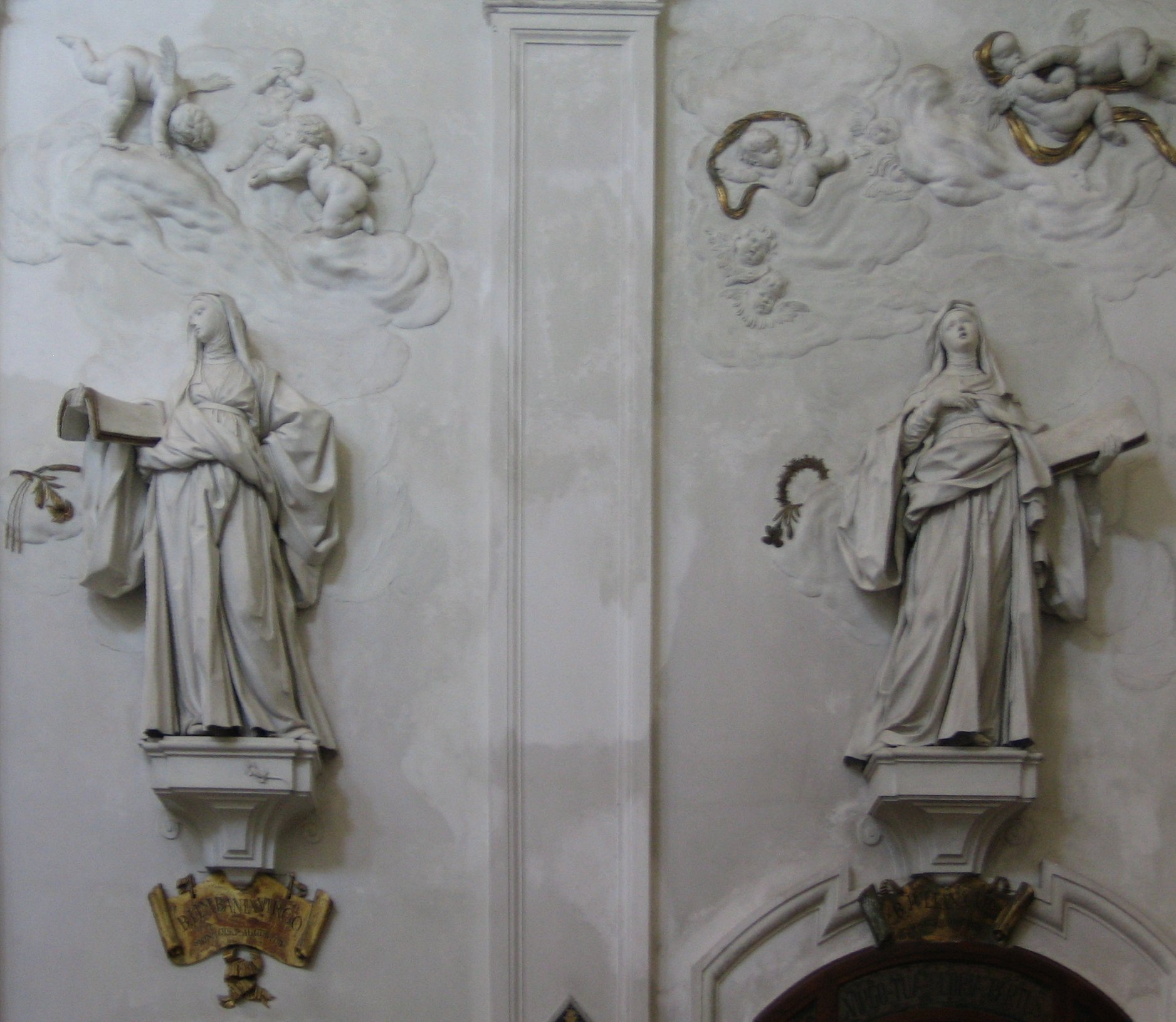 Palermo, Chiesa di Sant'Agostino: statue in stucco di Giacomo Serpotta (1711; 1729). A sinistra: Santa Felicita, a destra: Santa Basilica, entrambe sorelle di Sant'Agostino, Foto personale di Mfprimo